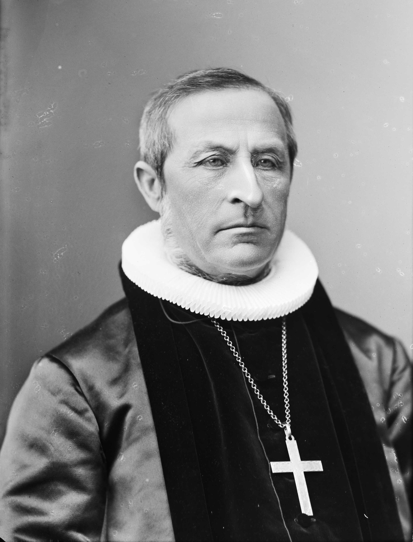 Arnoldus Hille (1829–1919), biskop i Hamar stift fra 1887 til 1906.